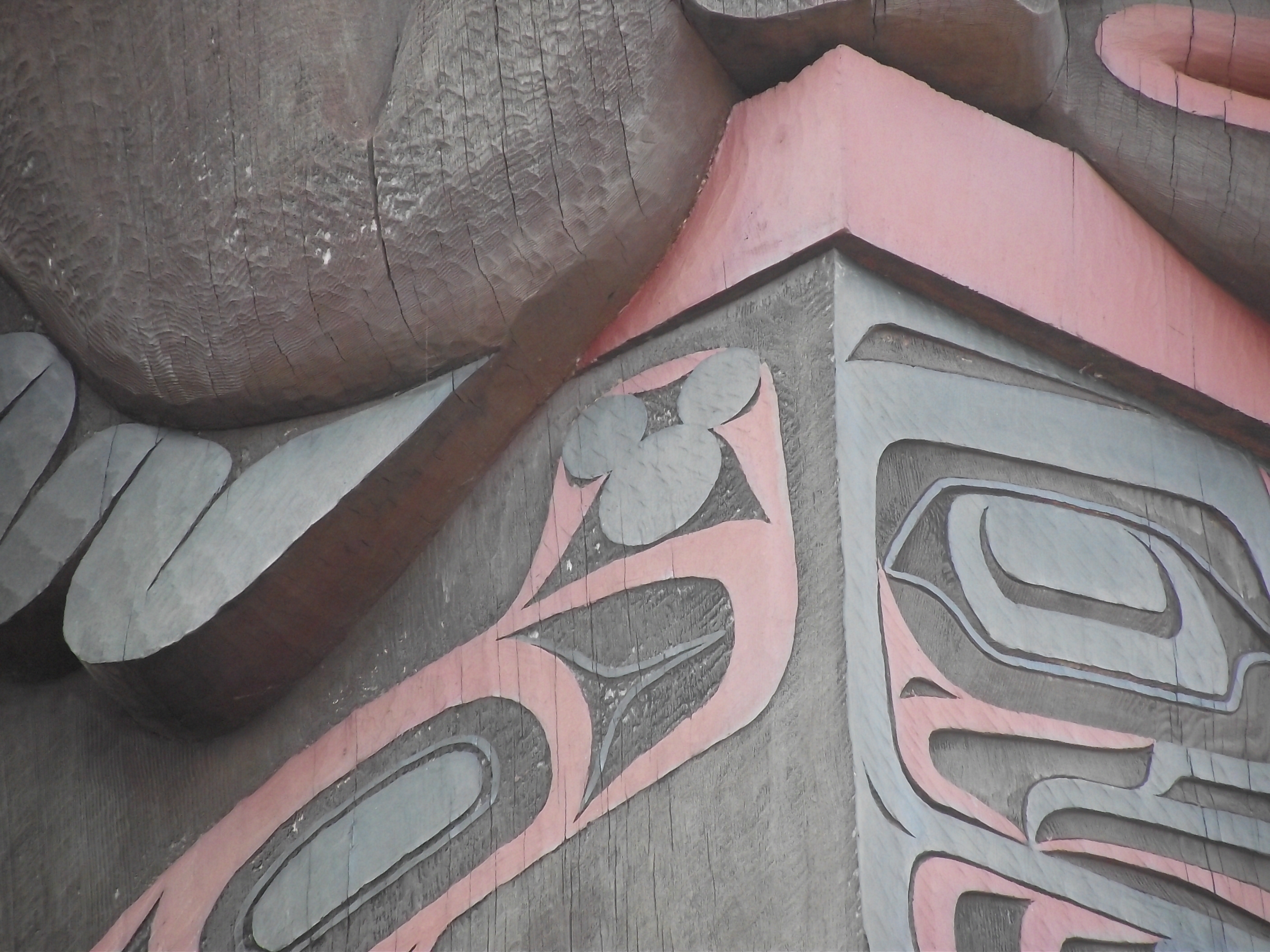 Hidden Mickey sur un totem du Canada